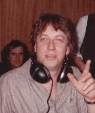 Alfred presenteerde hier Pep op 3 vanuit het muziekpaviljoen voor de VARA tijdens de wekelijkse VARA dinsdag.